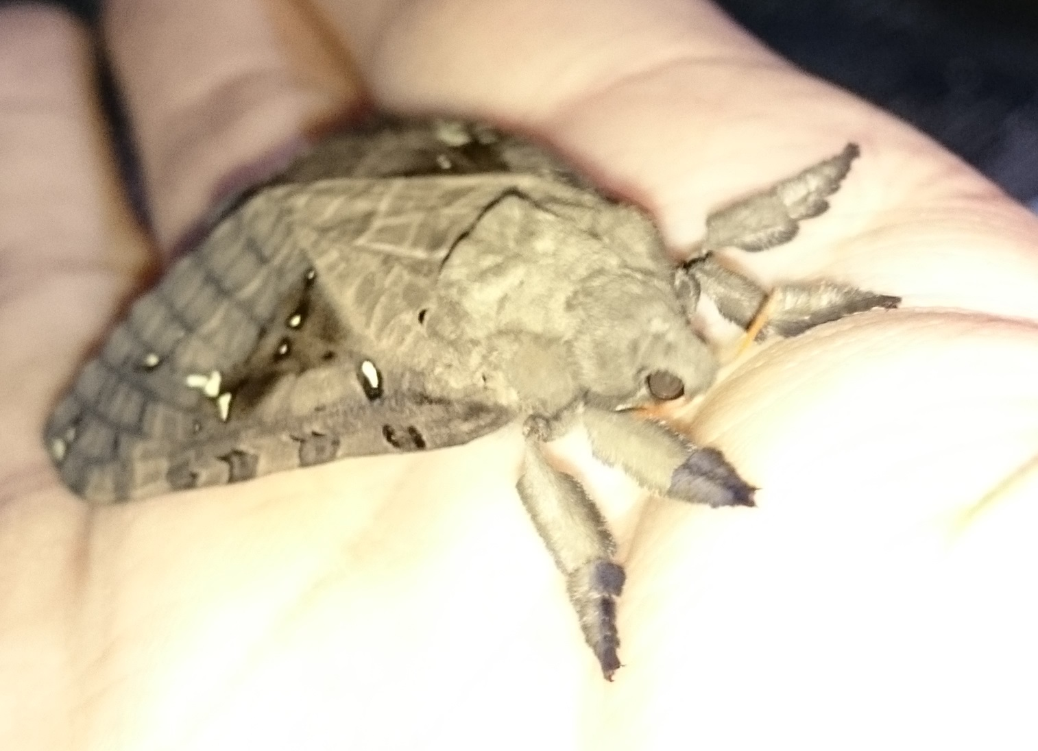 キマダラコウモリ